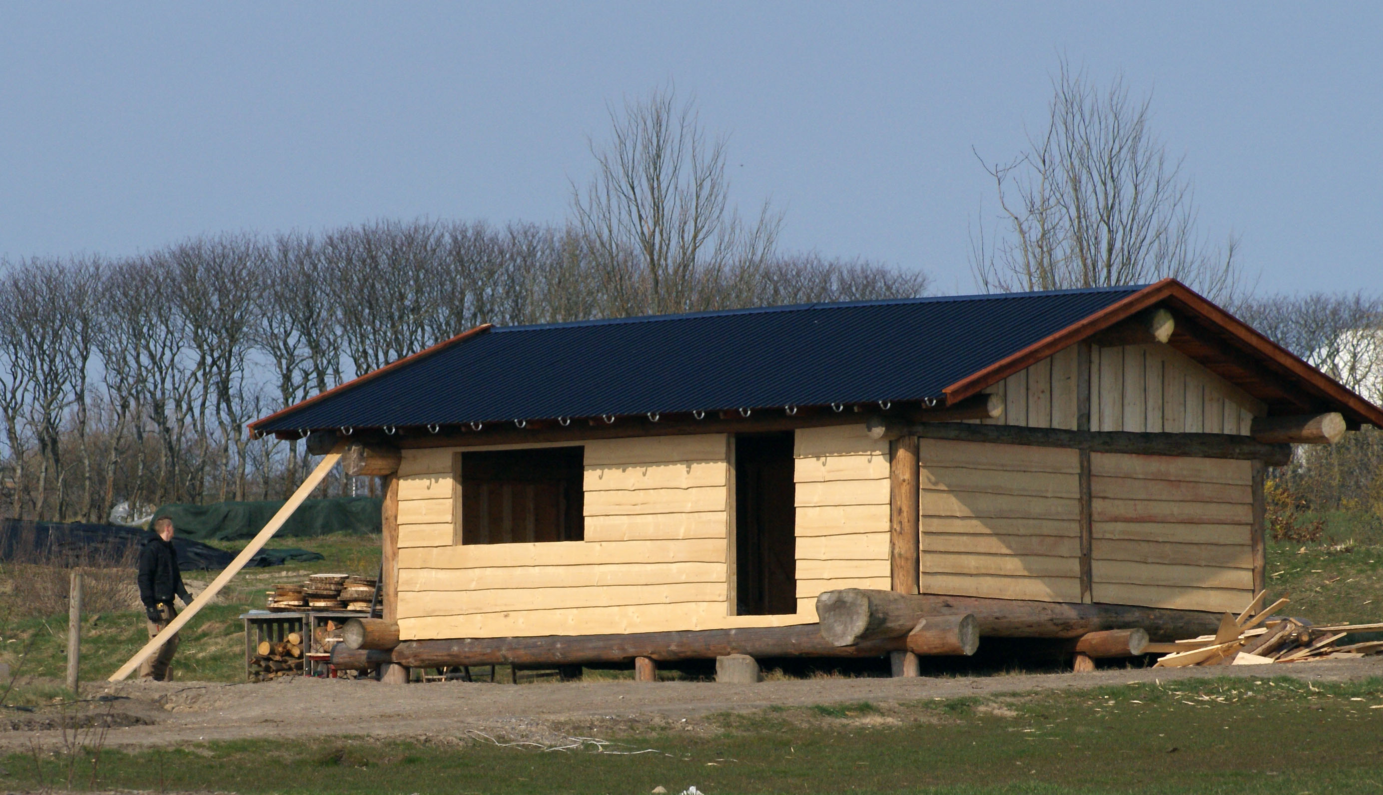 En del af tech college aalborg